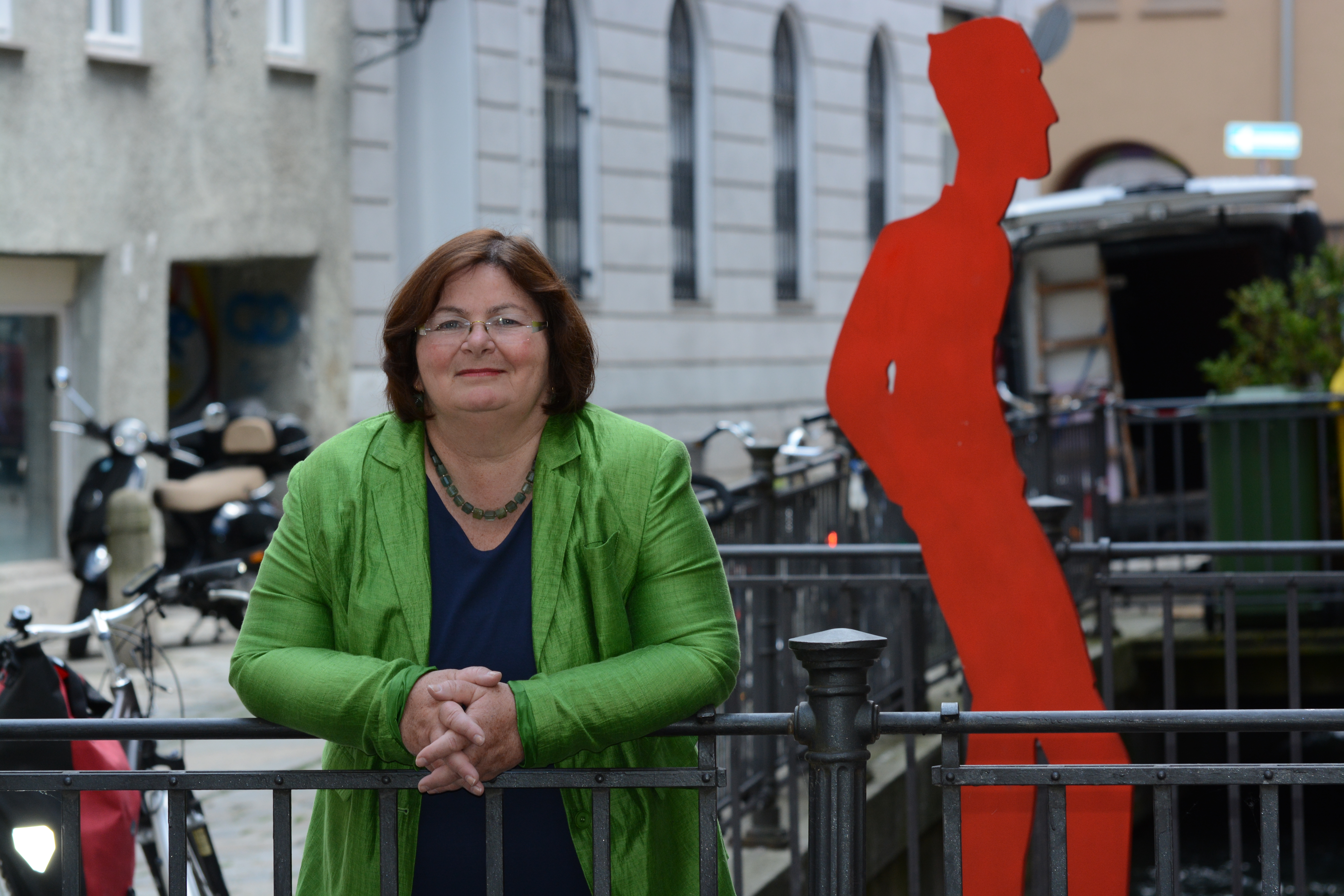 Christine Kamm Abgeordnete des Bayerischen Landtags Sprecherin für Europapolitik, Asylpolitik und Integration Bündnis90/Die Grünen Parlamentarische Funktion Mitglied des Ausschusses für Arbeit und Soziales, Jugend, Familie und Integration Mitglied des Ausschusses für Bundes- und Europaangelegenheiten sowie regionale Beziehungen Mitglied des Landtags: seit 06.10.2003